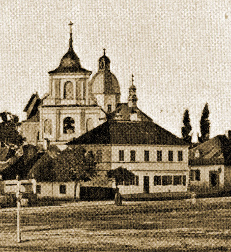 церква в ХІХ в.